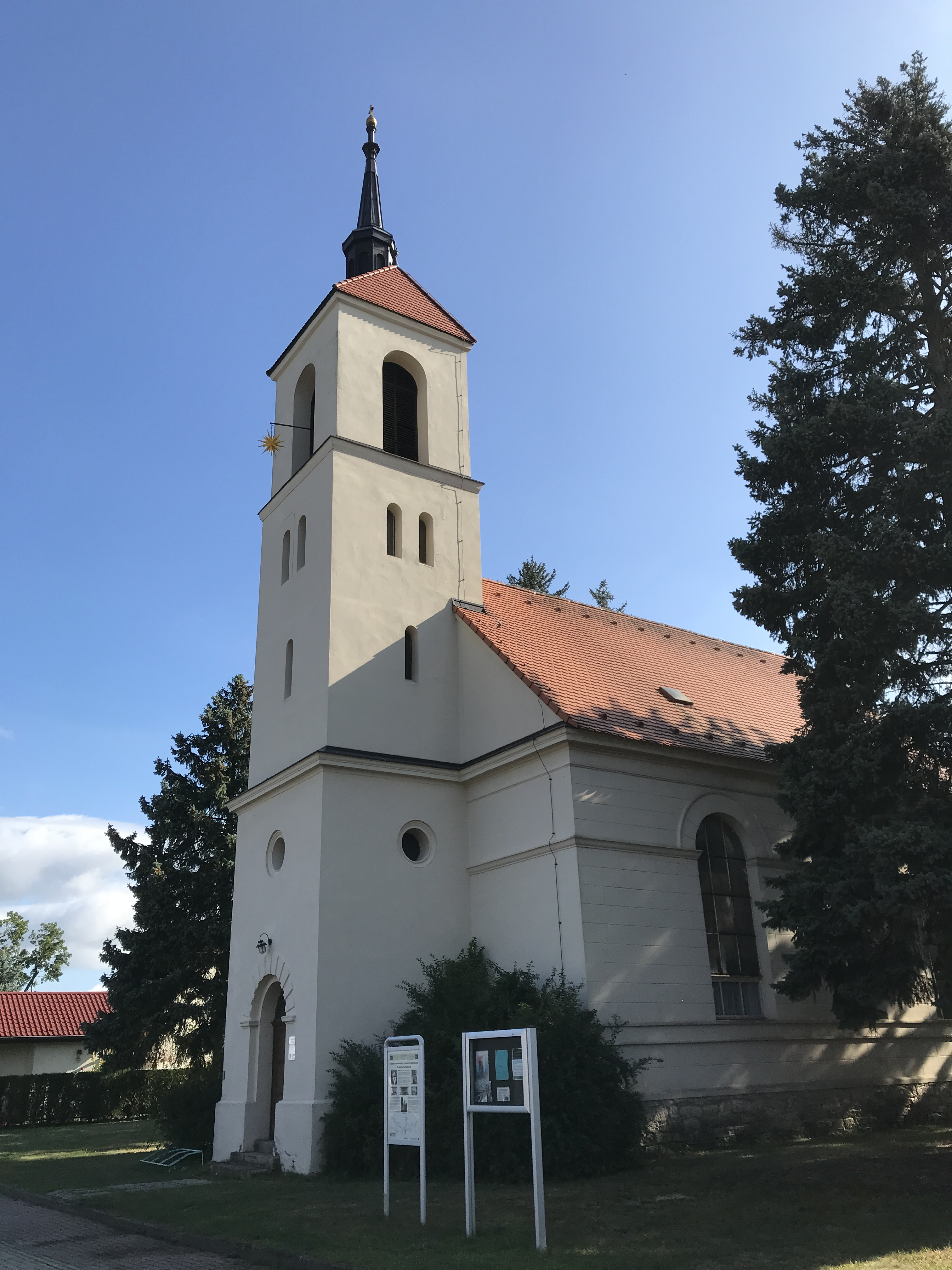 Die Dorfkirche Berkenbrück im Landkreis Oder-Spree entstand im Jahr 1832. Die Kirchenausstattung stammt aus der Bauzeit